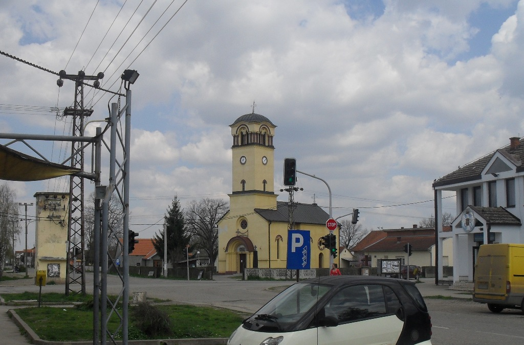 Центар Бадовинаца и храм СПЦ Свете Тројице, Мачва, Србија